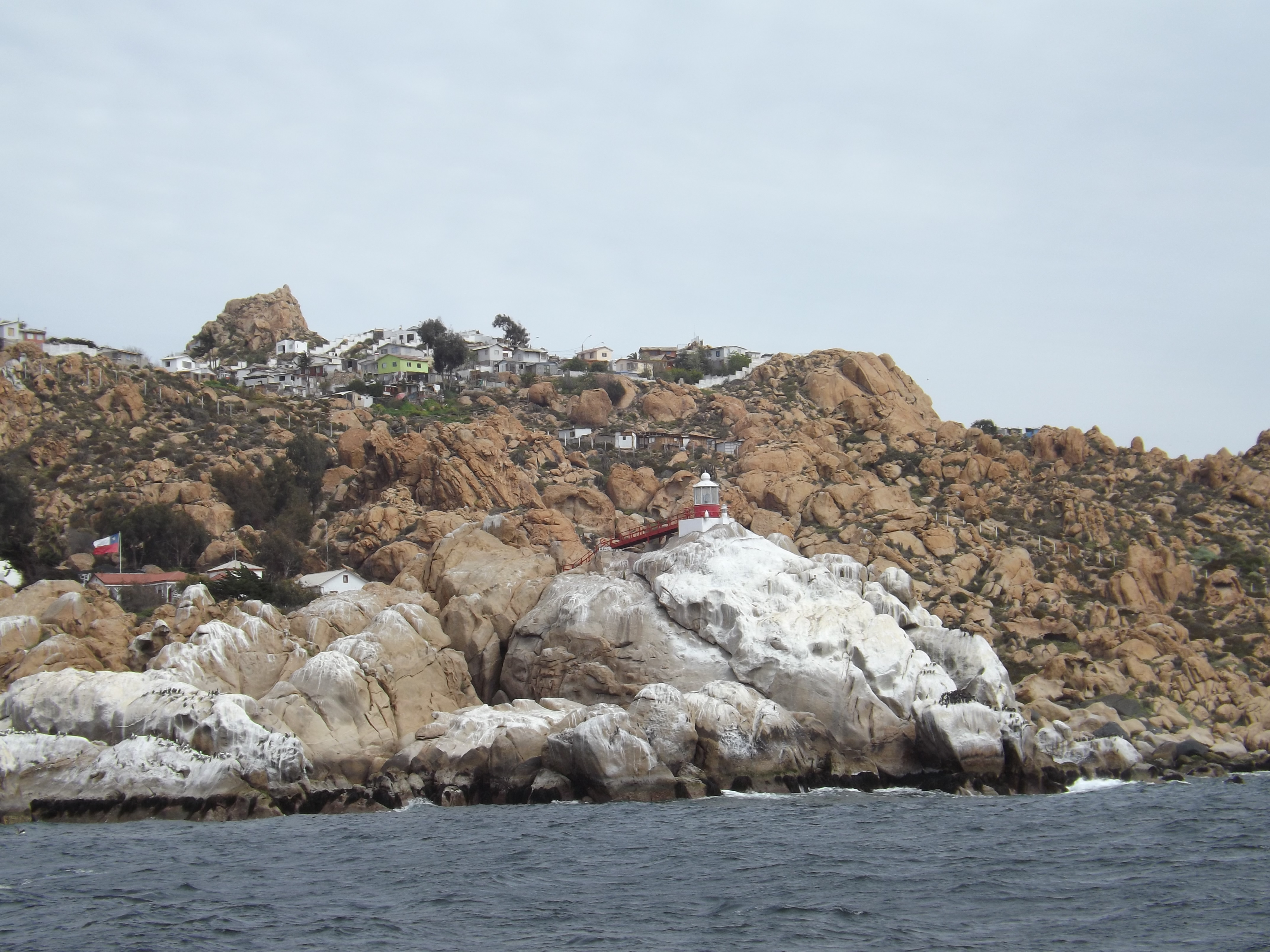 V Región de Chile